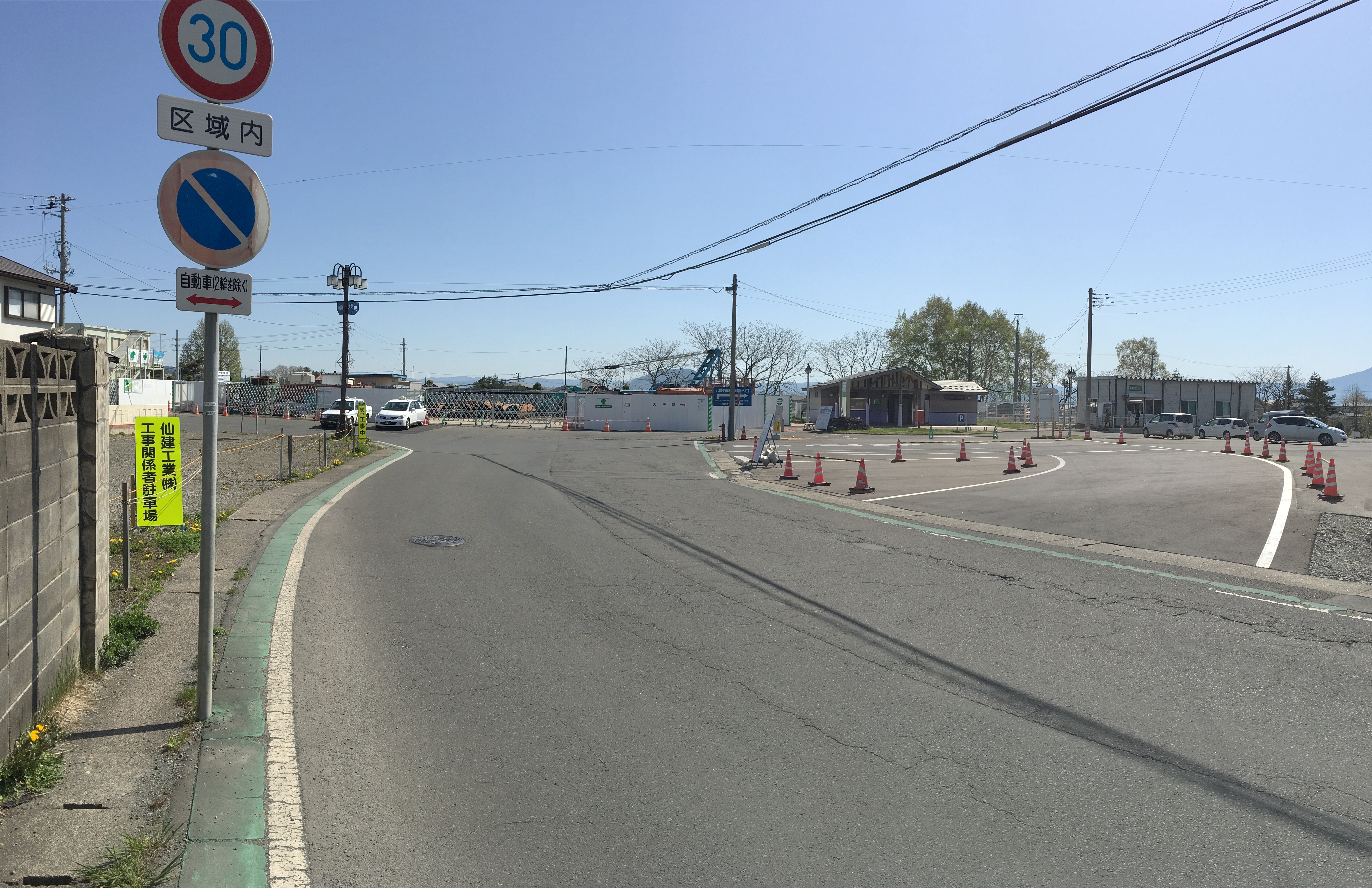 左手には建設中の現駅舎。右手には営業中の仮駅舎。2017年5月4日，大更駅にて撮影。